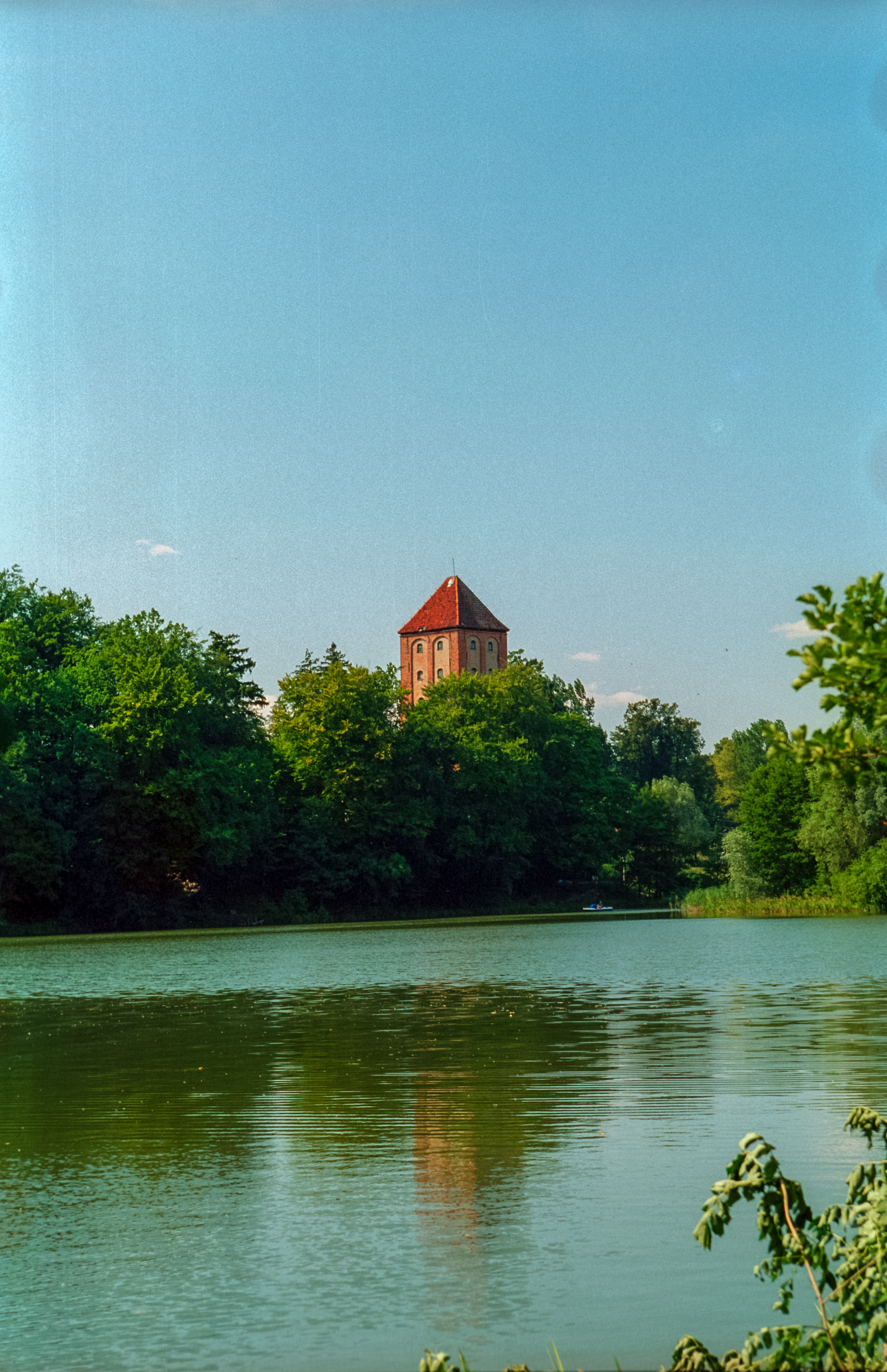 Przezmark